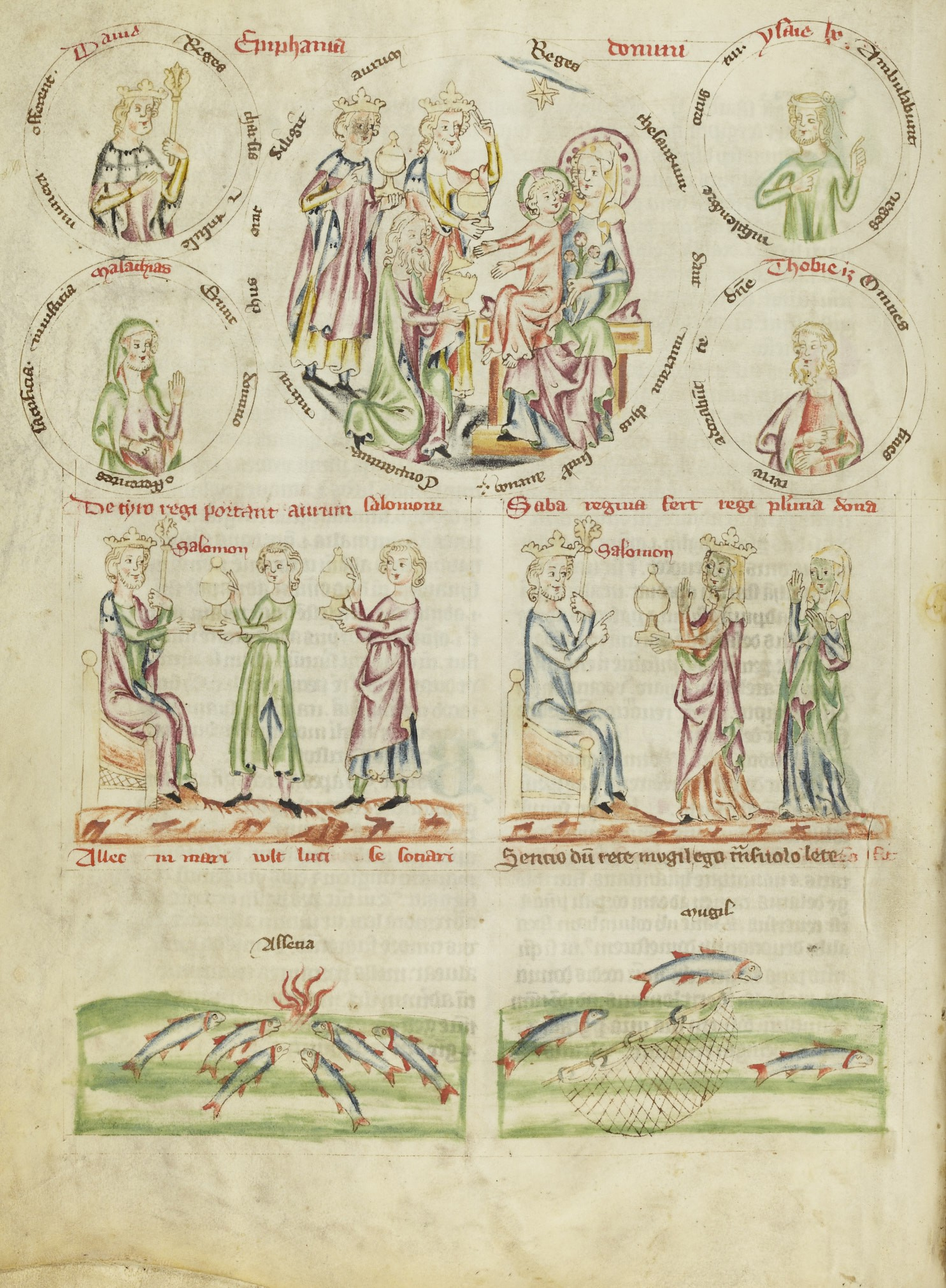 Lilien40